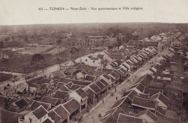 Toàn cảnh thành phố Nam Định khi mới xây xong.